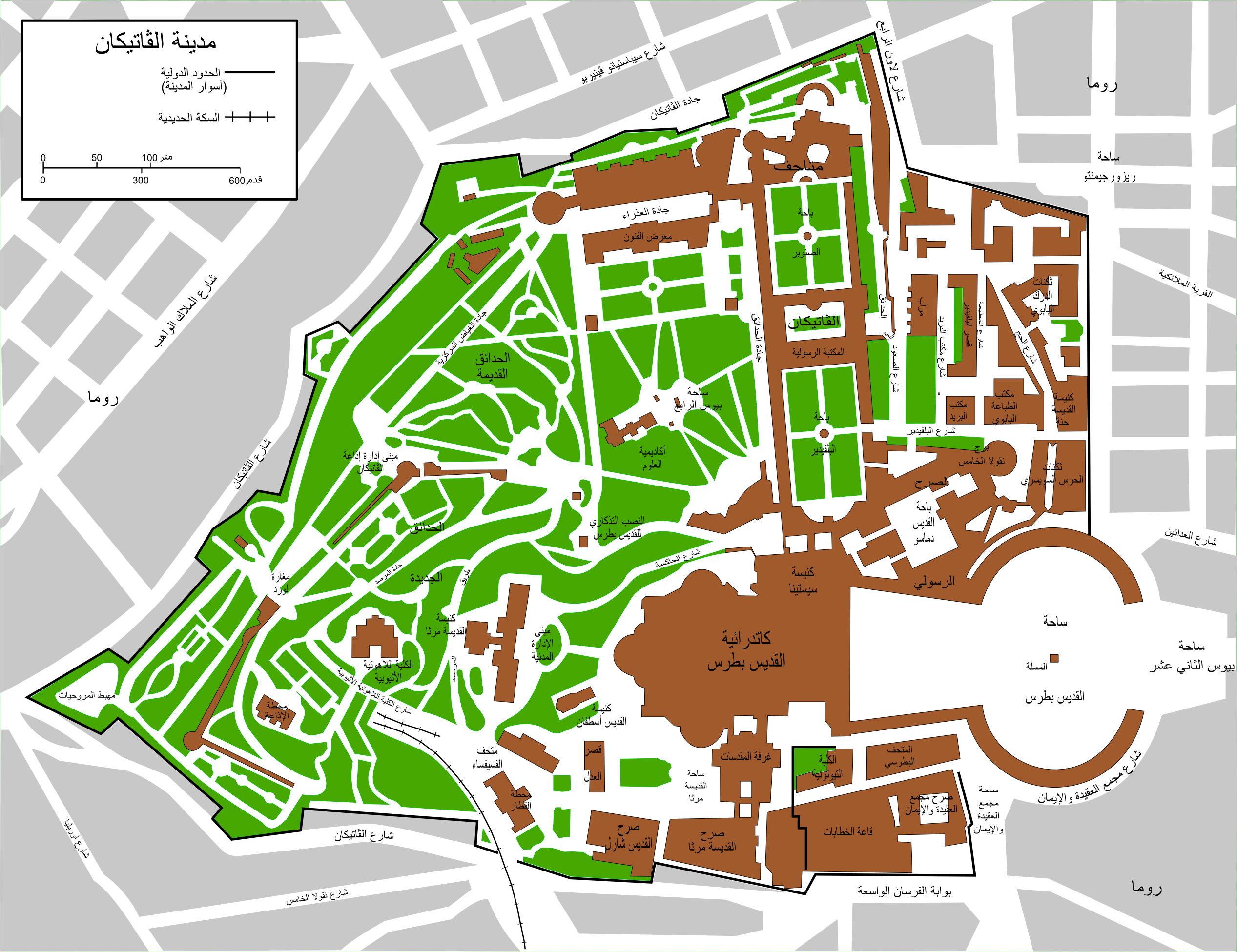 خارطة مدينة الفاتيكان (Città del Vaticano).